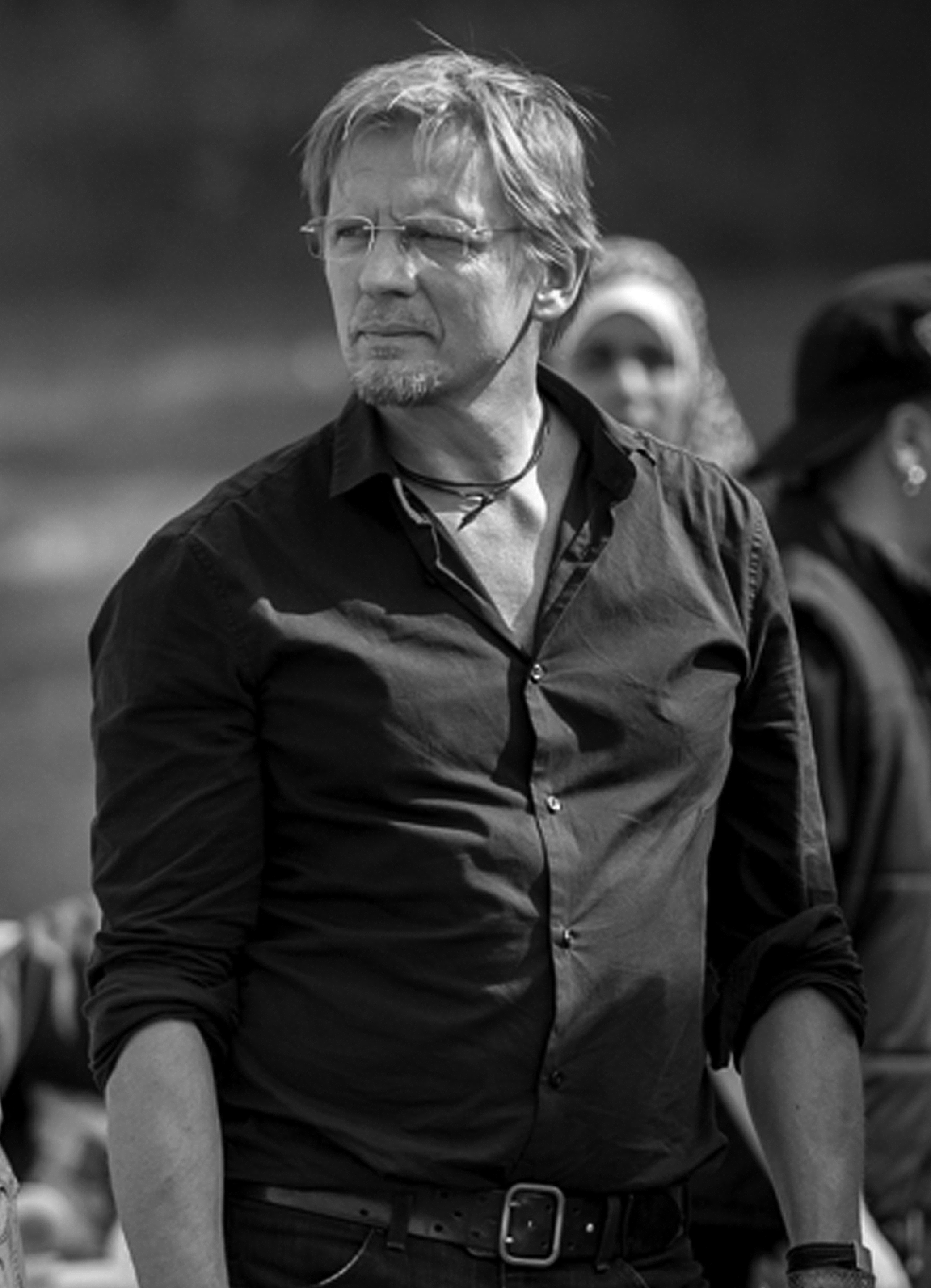 Johan Ferner Ström. Photo: David Puig Serinyà/Glósóli Ateljé